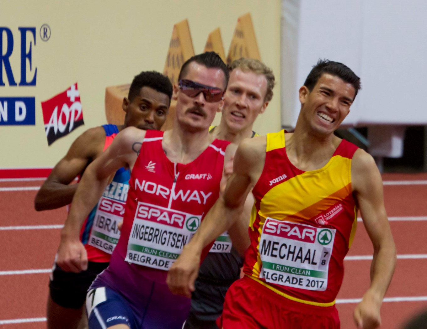 318 3000m fin ingebrigtsen mechaal